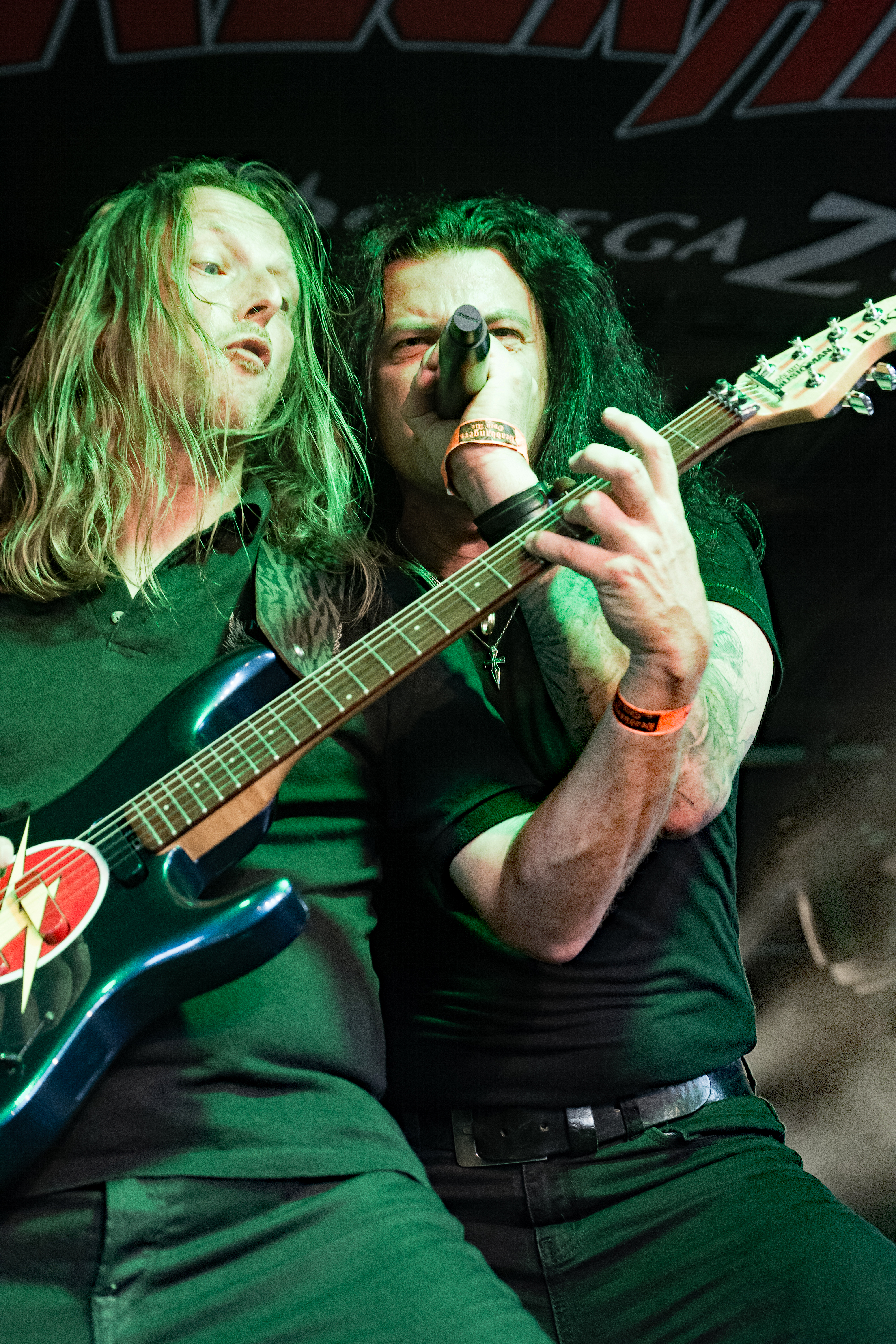 Ostrogoth beim Headbangers Open Air 2016